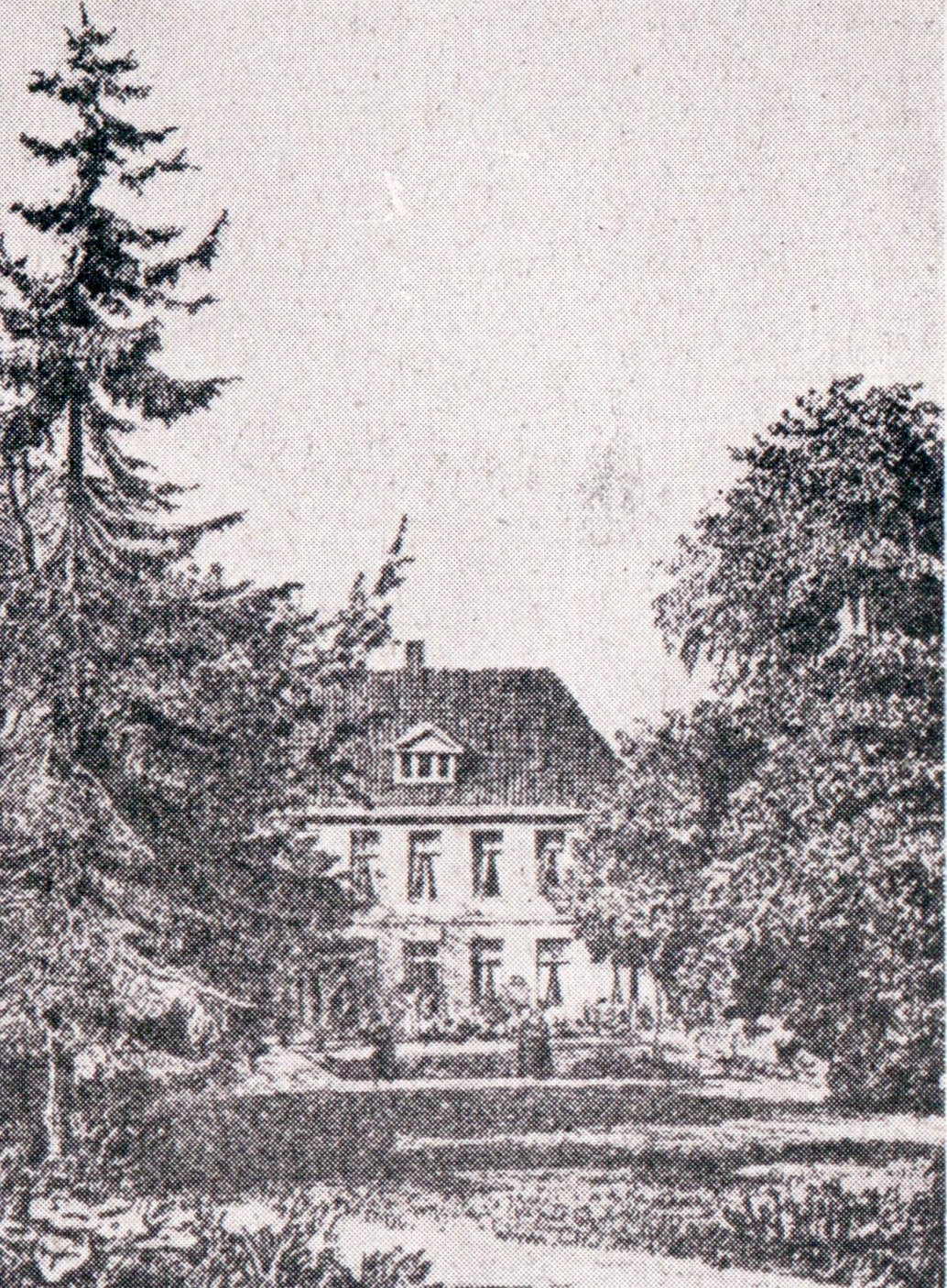 Villa am Harvestehuder Weg, Hamburg; Lithographie von Valentin Ruths: Landhäuser an der Alster - In: Panorama der Landhäuser an der Alster bis nach Harvestehude (1850), S.1; Ausschnitt, hier: Harvestehuder Weg 20